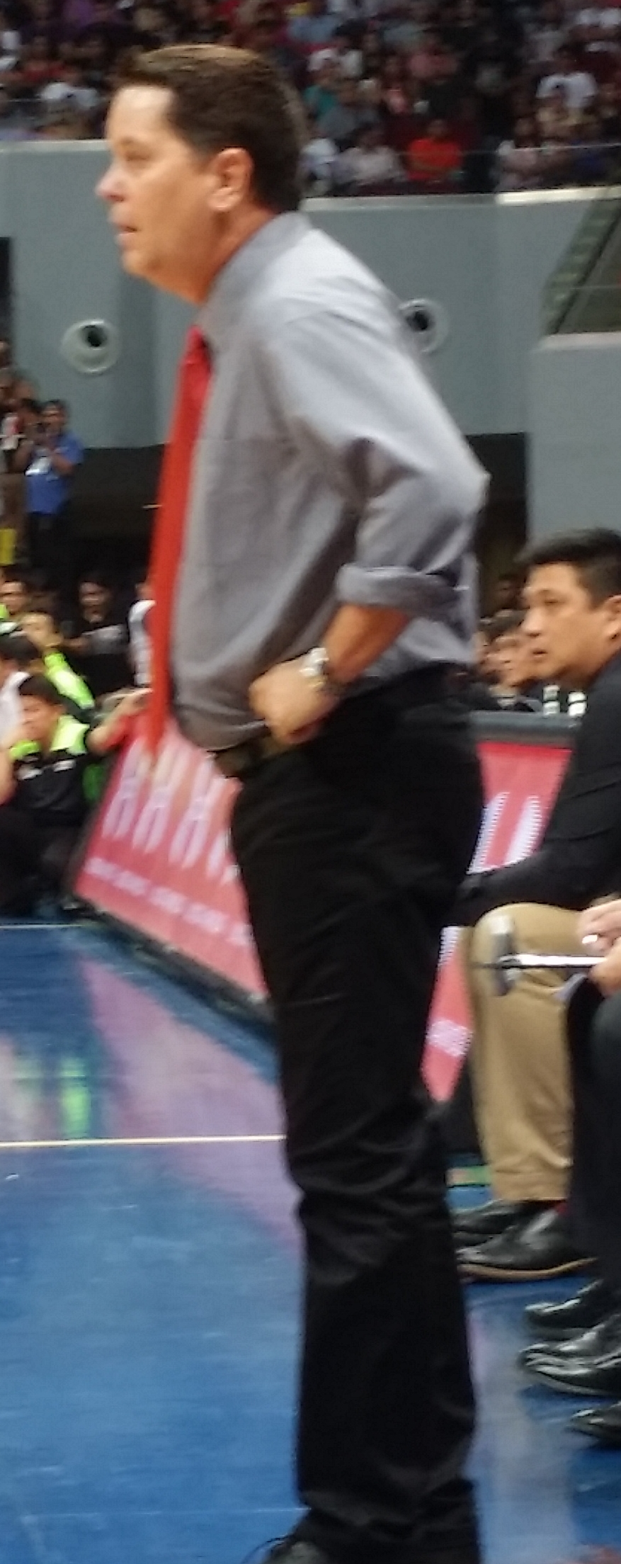 PBA - Barangay Ginebra vs GlobalPort - Tim Cone-Ginebra - 2015-1227